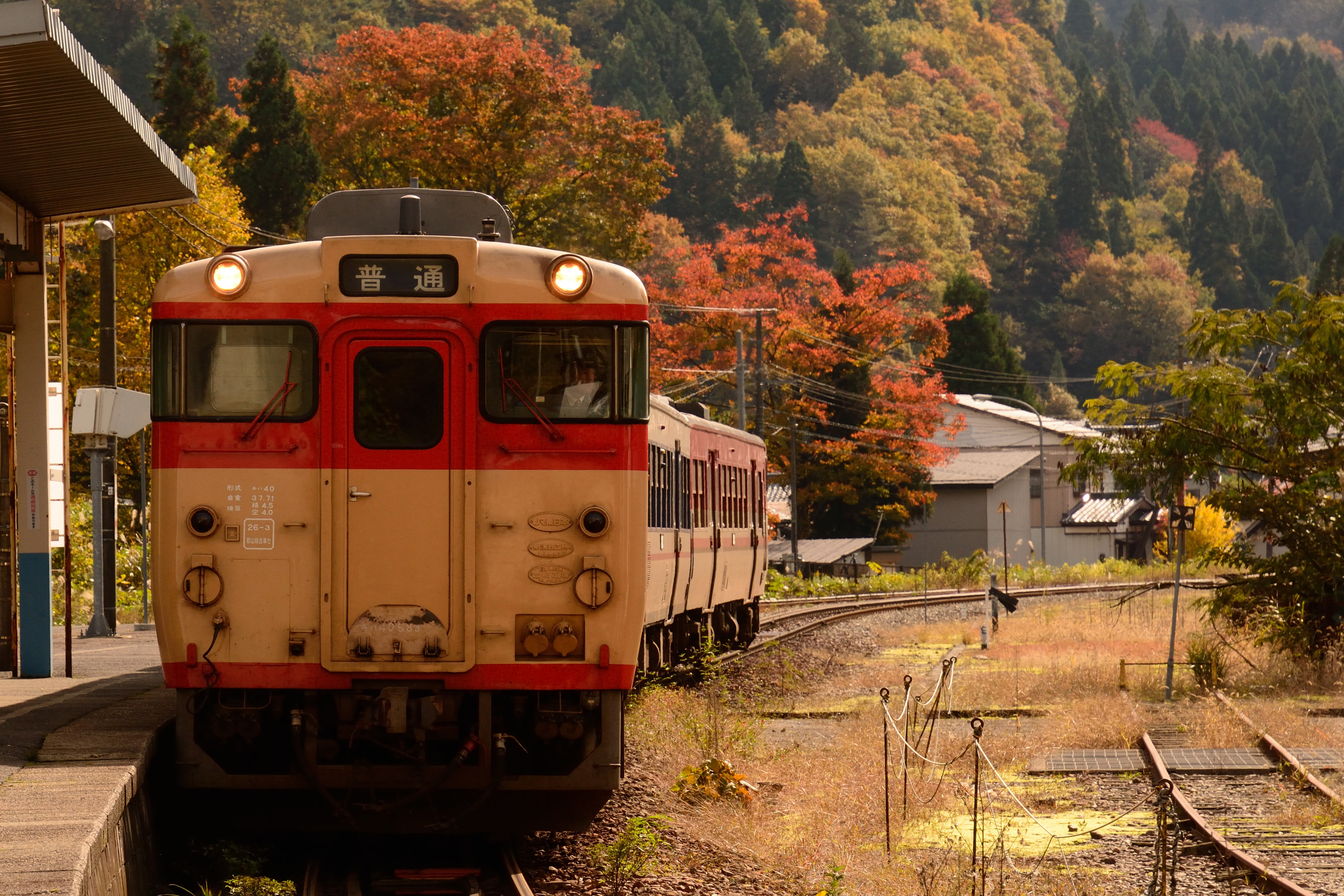 五泉方面停車中のキハ40・キハ47（2014年11月）